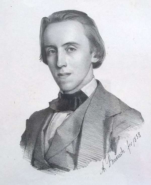 Portraitzeichnung von Hermann Deiters aus dem Jahr 1858, gezeichnet von August Bausch